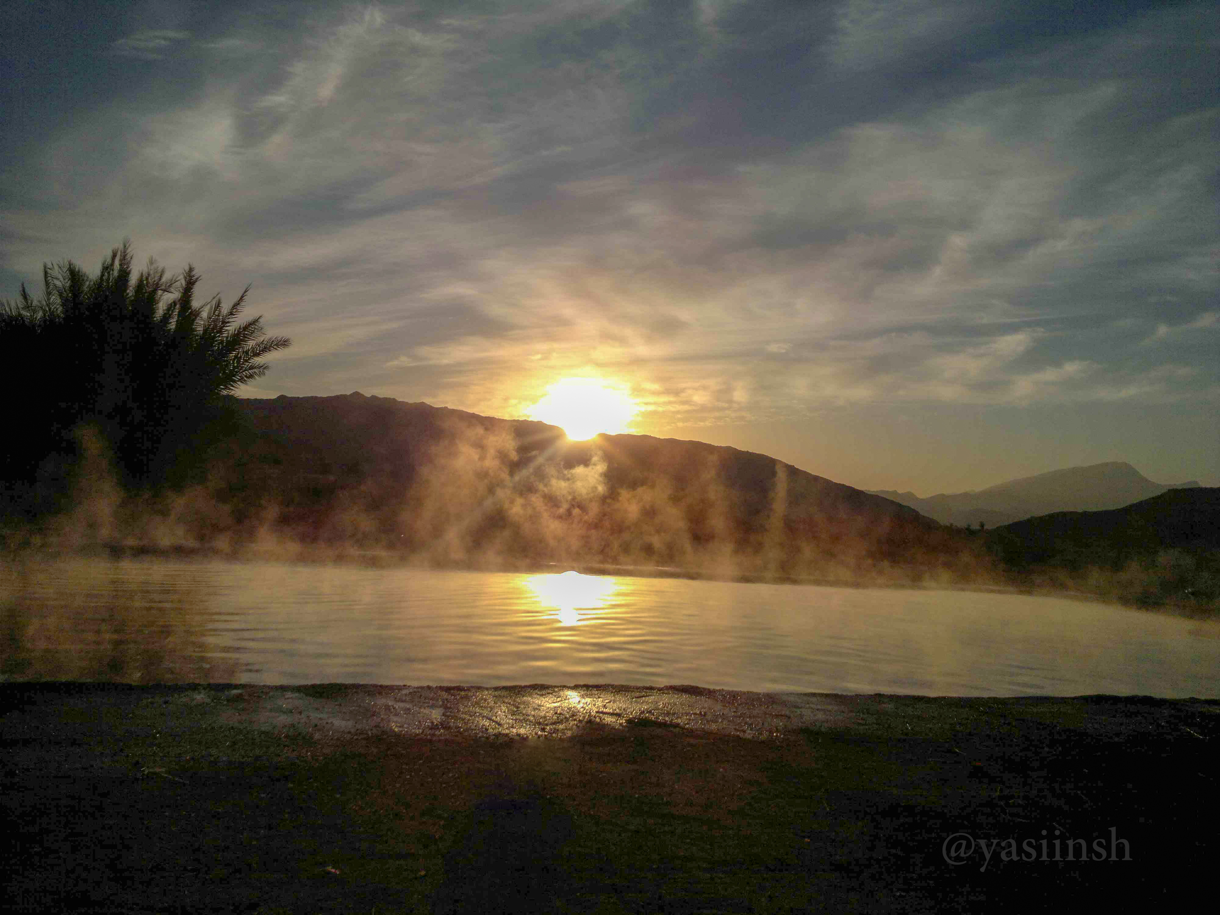 ساعت 7 صبح :چشمه‌ی آب گرم آب‌بوی واقع در شمال شهر دهرم - عکس: یاسین دهرمی‌نیا